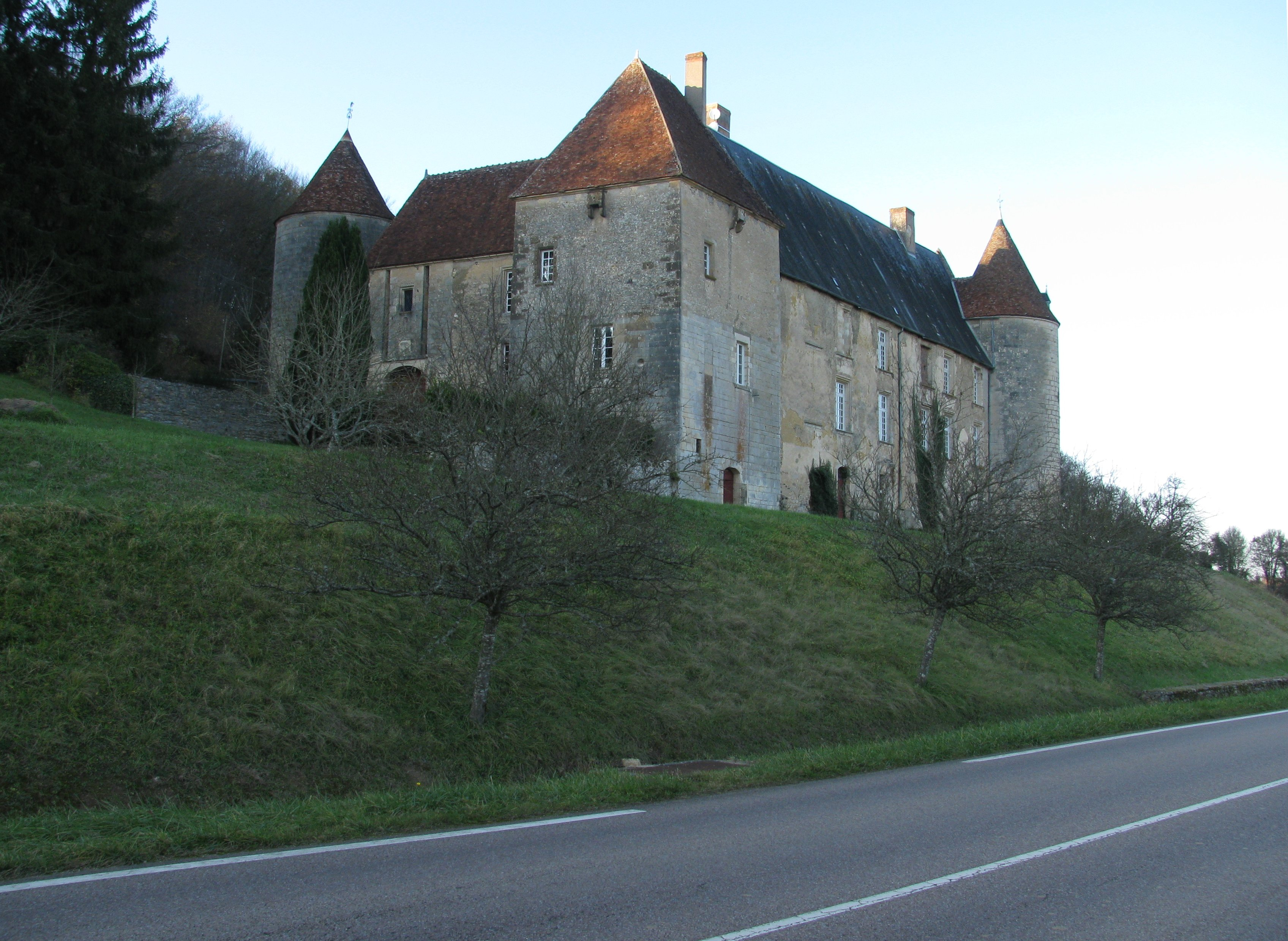 Château de Giry, dans le département de la Nièvre, France.